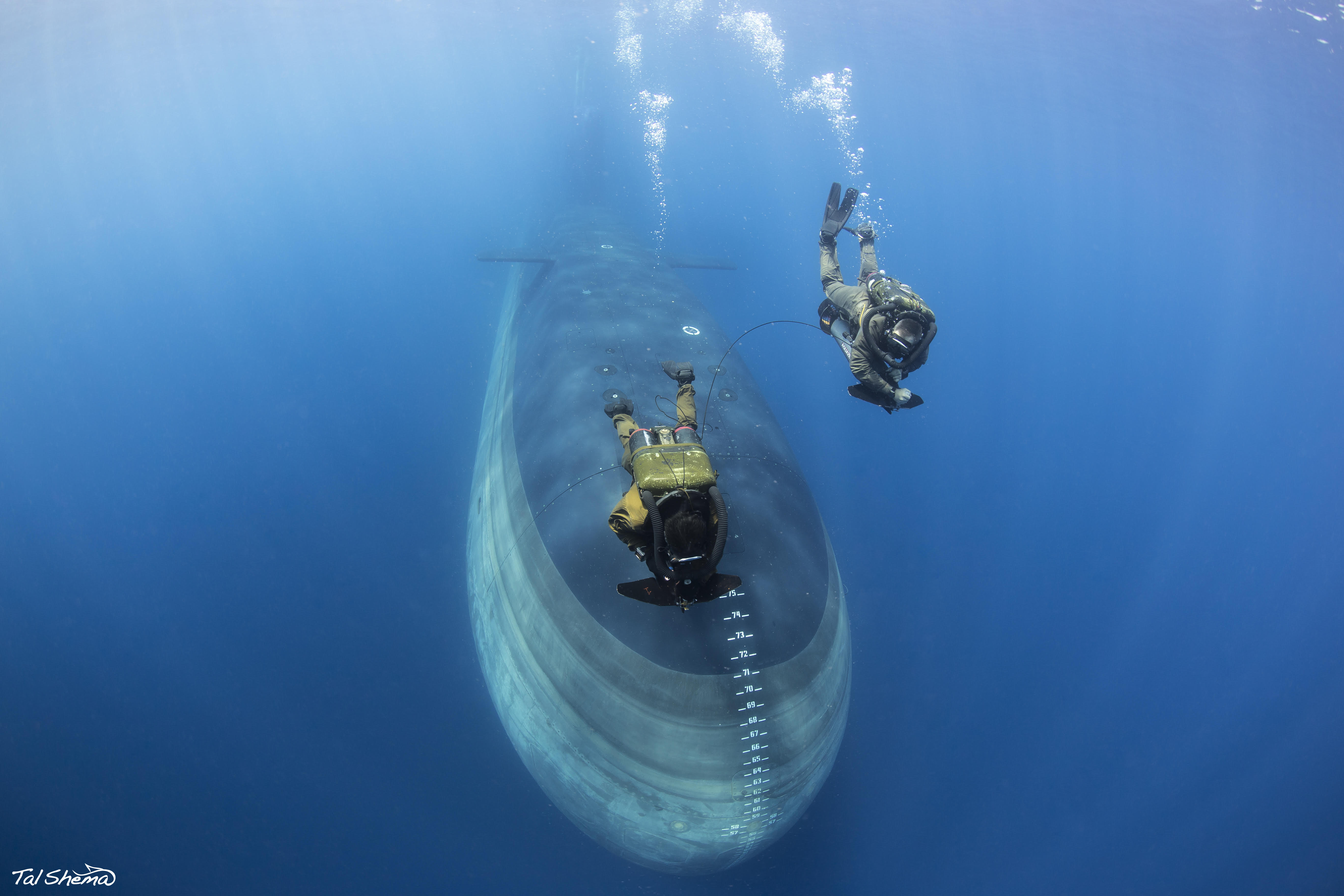 אימון היחידה עם שטיית הצוללת